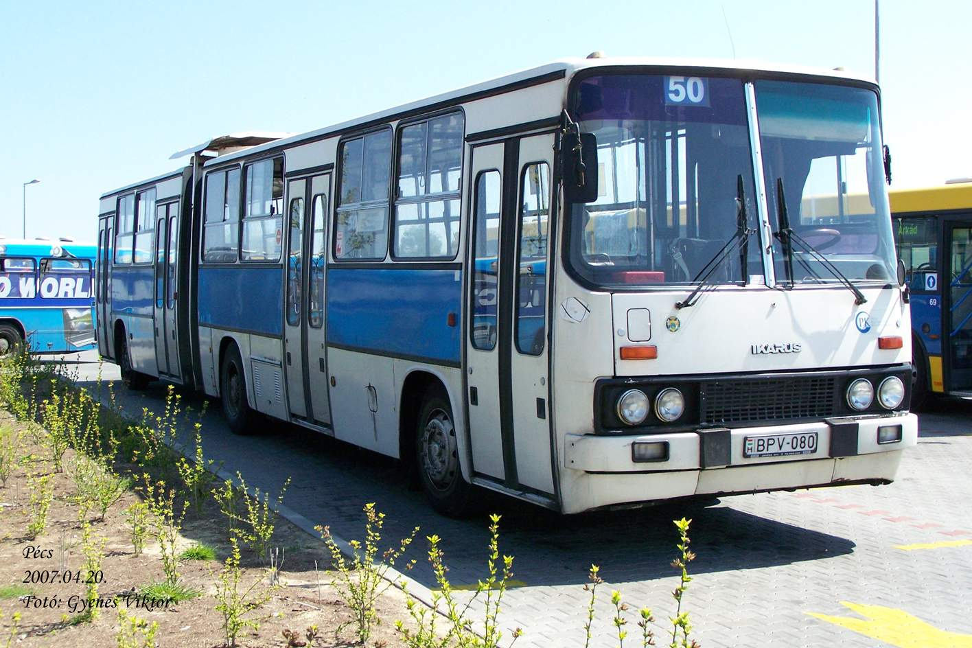 Ikarus 280-as Pécsett a 50-es vonalon